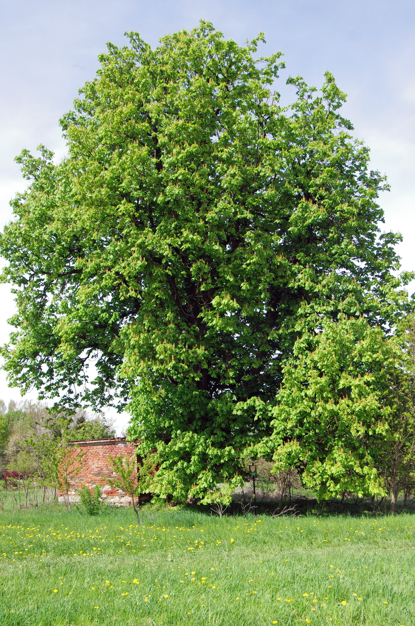 památný strom Jírovec u Mariánské kapličky v Jankovicích, Jankovice (Teplá), okres Cheb